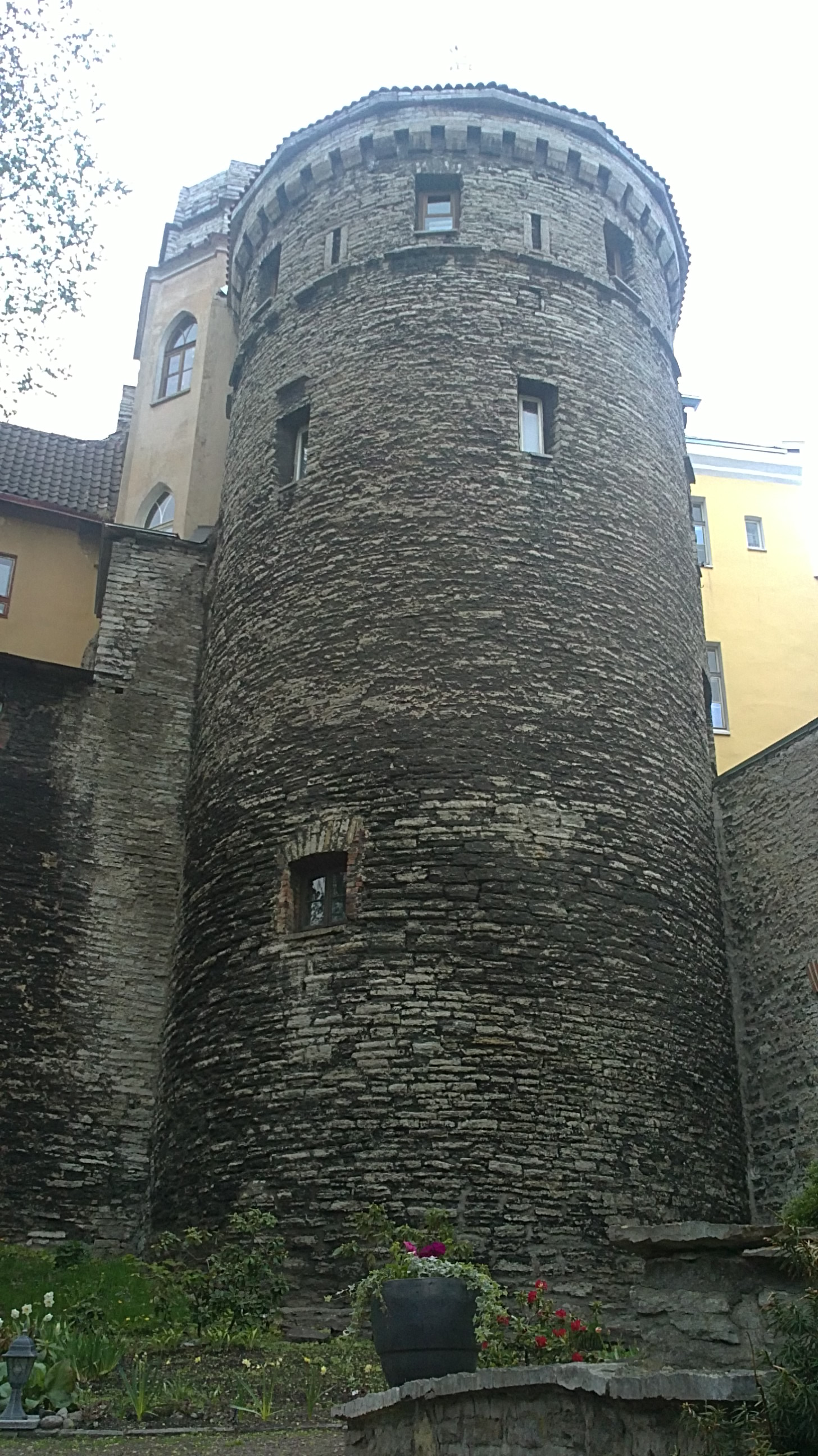 Tallinna linnamüüri Hattorpe tagune torn, Tallinna vanalinnas, aadressil Pikk tänav 62 / Uus tänav, vaade Šoti klubi hoovist, Uus tänav 33.